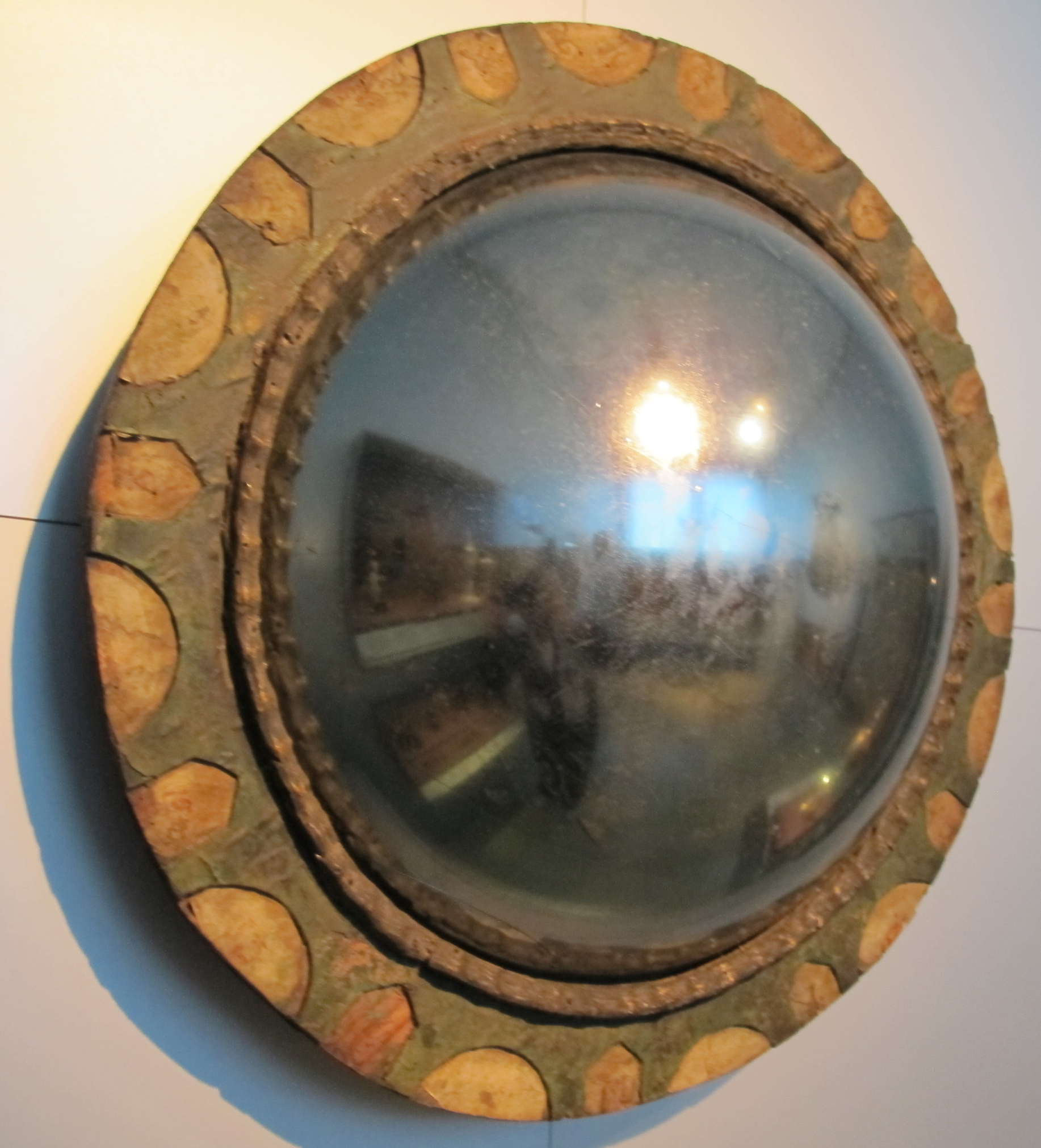 Specchio convesso, forse da franconia, XVI sec.